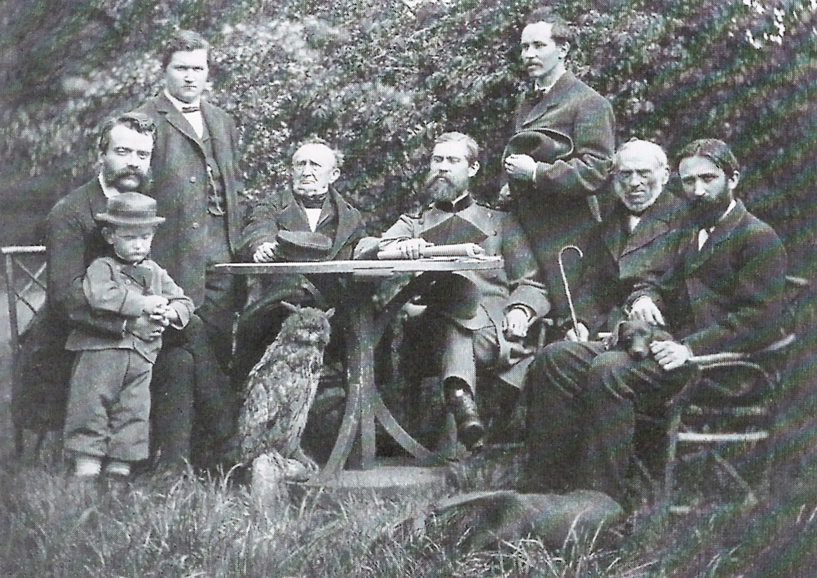 Teachers of the school of forestry in Neustadt-Eberswalde around 1868 (from left): Robert Hartig (with Peter Danckelmann in his arms), unknown, Julius Theodor Christian Ratzeburg, Bernhard Danckelmann, Adolf Remelé, Wilhelm Schneider and Wilhelm Schütze / Lehrpersonal der Forstakademie Neustadt-Eberswalde ca. 1868 (v.l.): Robert Hartig (mit Peter Danckelmann im Arm), unbekannt, Julius Theodor Christian Ratzeburg, Bernhard Danckelmann, Adolf Remelé, Wilhelm Schneider und Wilhelm Schütze